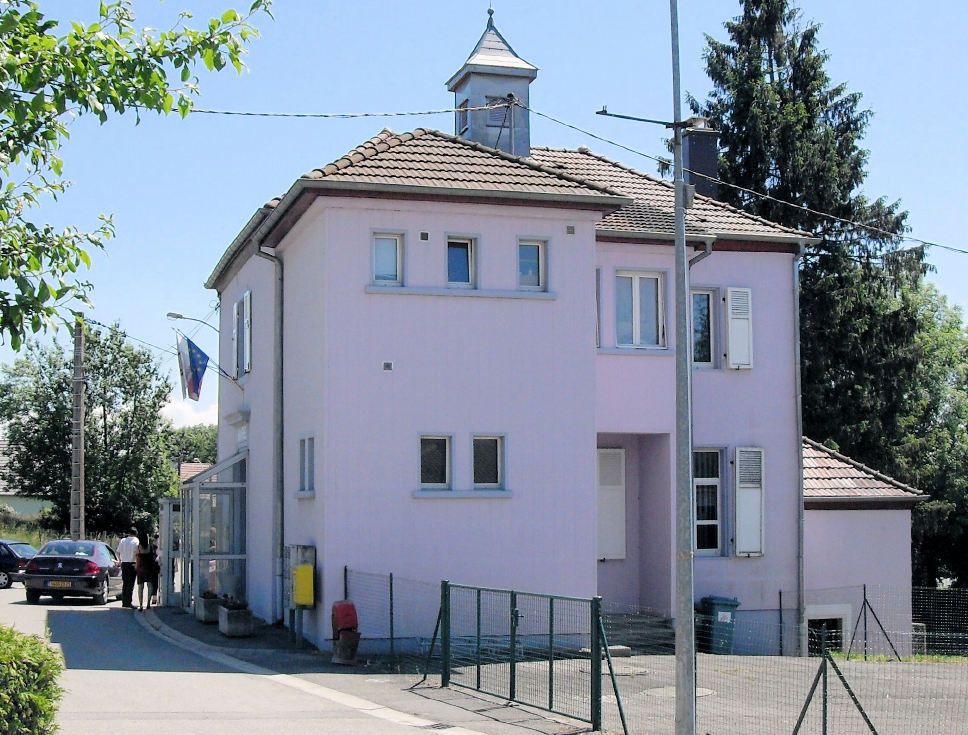 La mairie de Magny